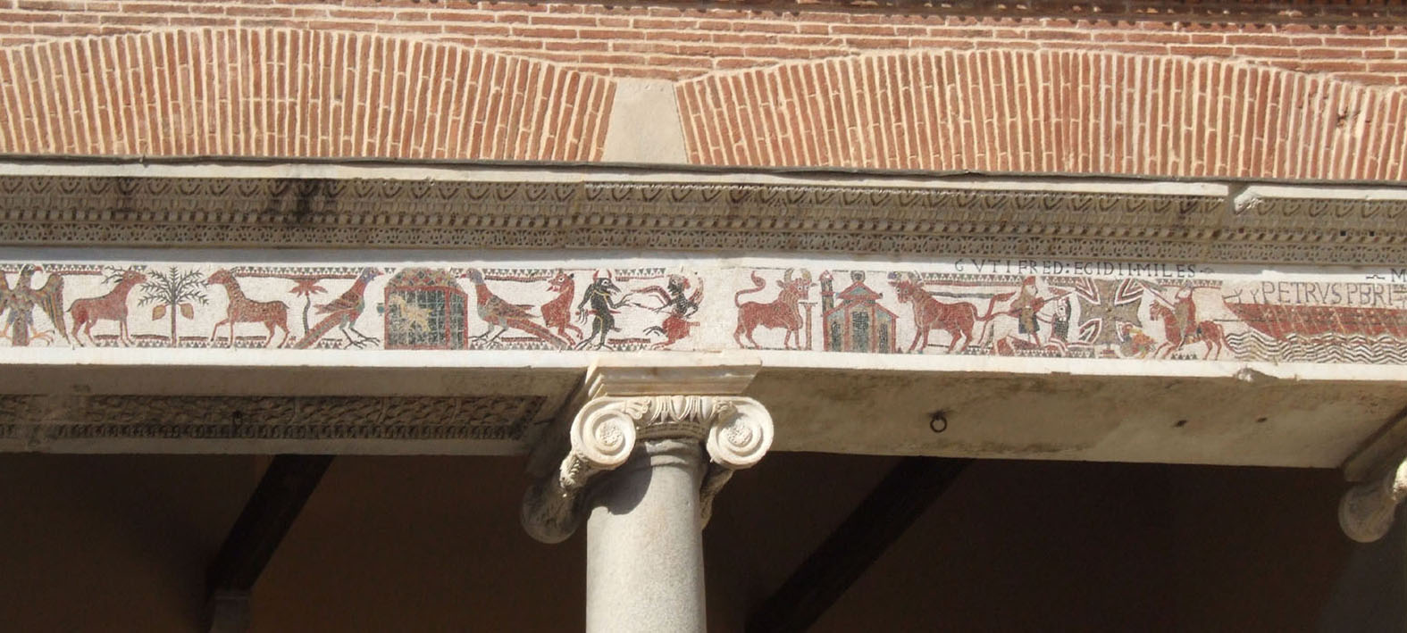 Fries am Dom von Terracina